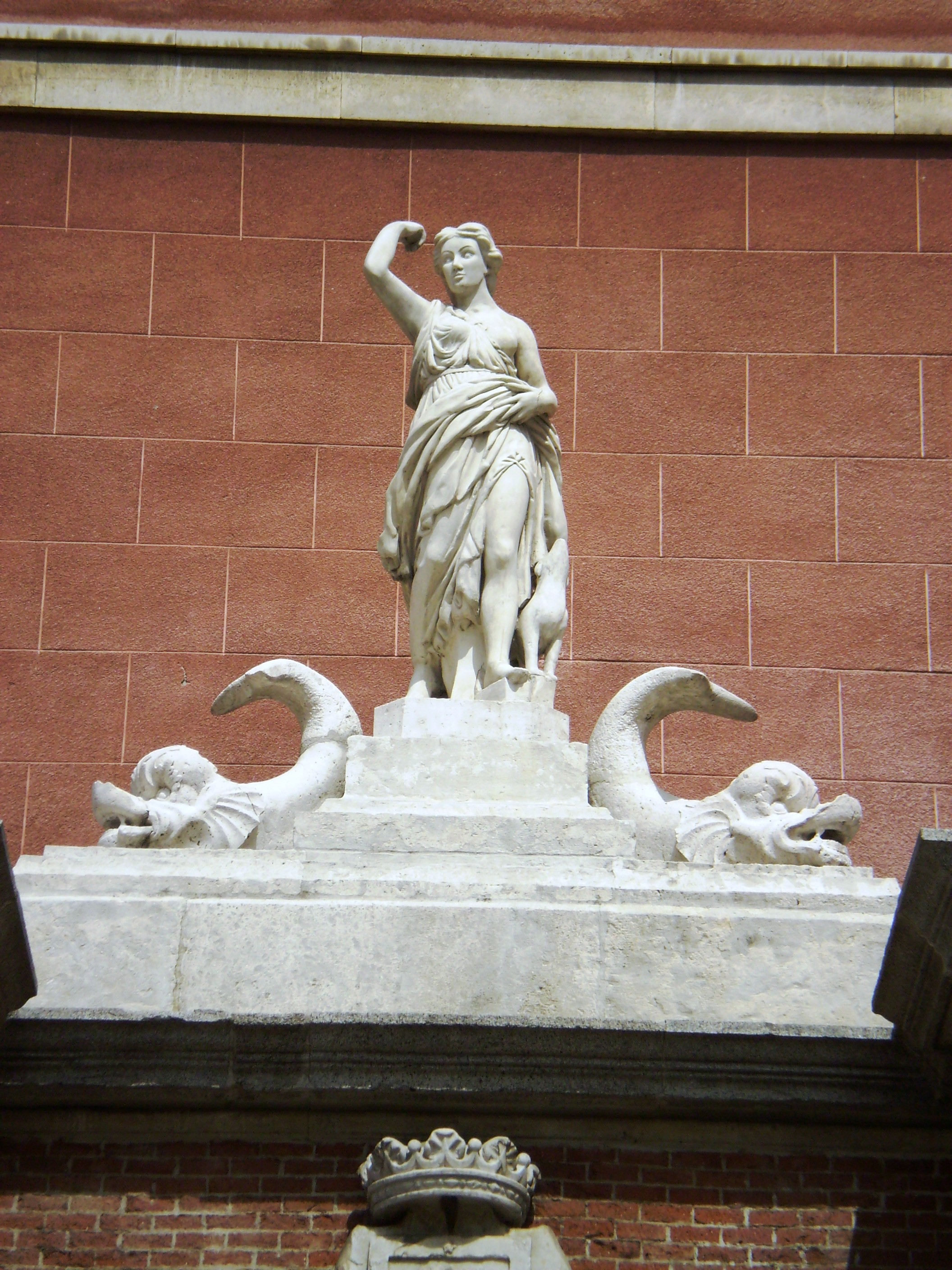 Fuente de Diana Cazadora o de la Cruz Verde. Fountain of 19th cent. in Madrid, Spain